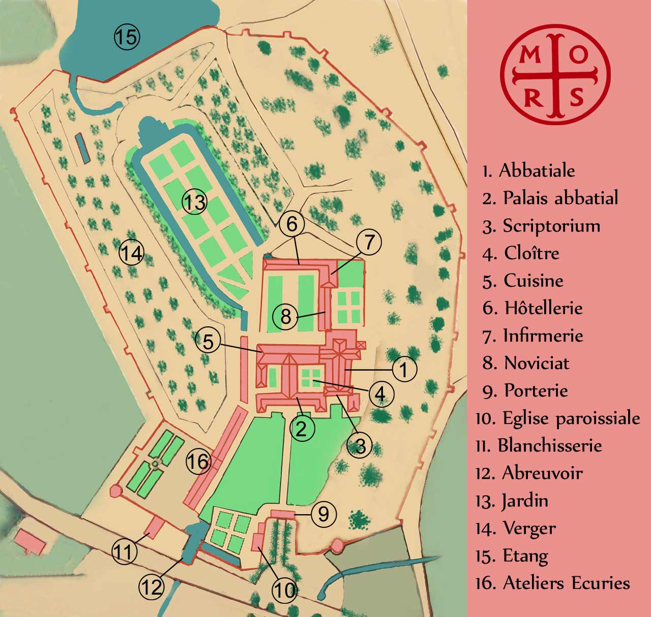 plan de l'abbaye de MORIMOND d'aprés une planche de 1789